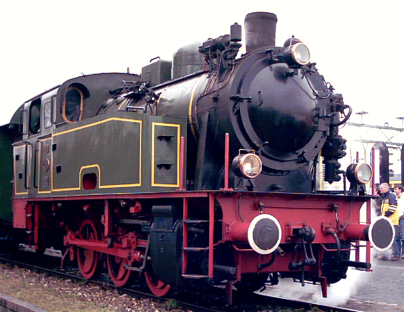 Loc 22 "Tom", Hoogovens, Nederland.